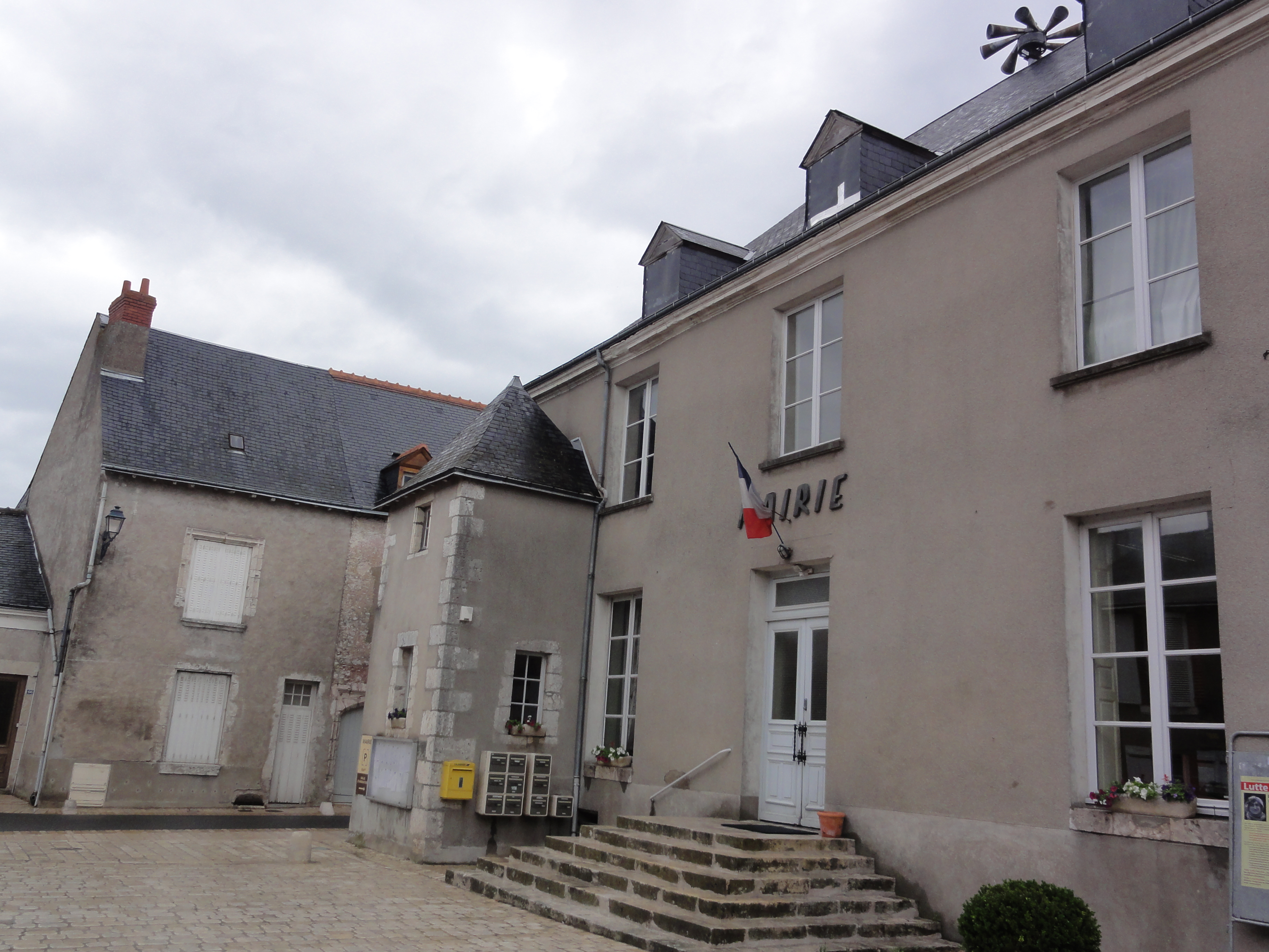 Saint-Dyé-sur-Loire (Loir-et-Cher) Mairie